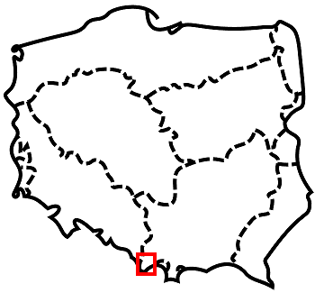 Położenie Żywiecczyzny na mapie Polski